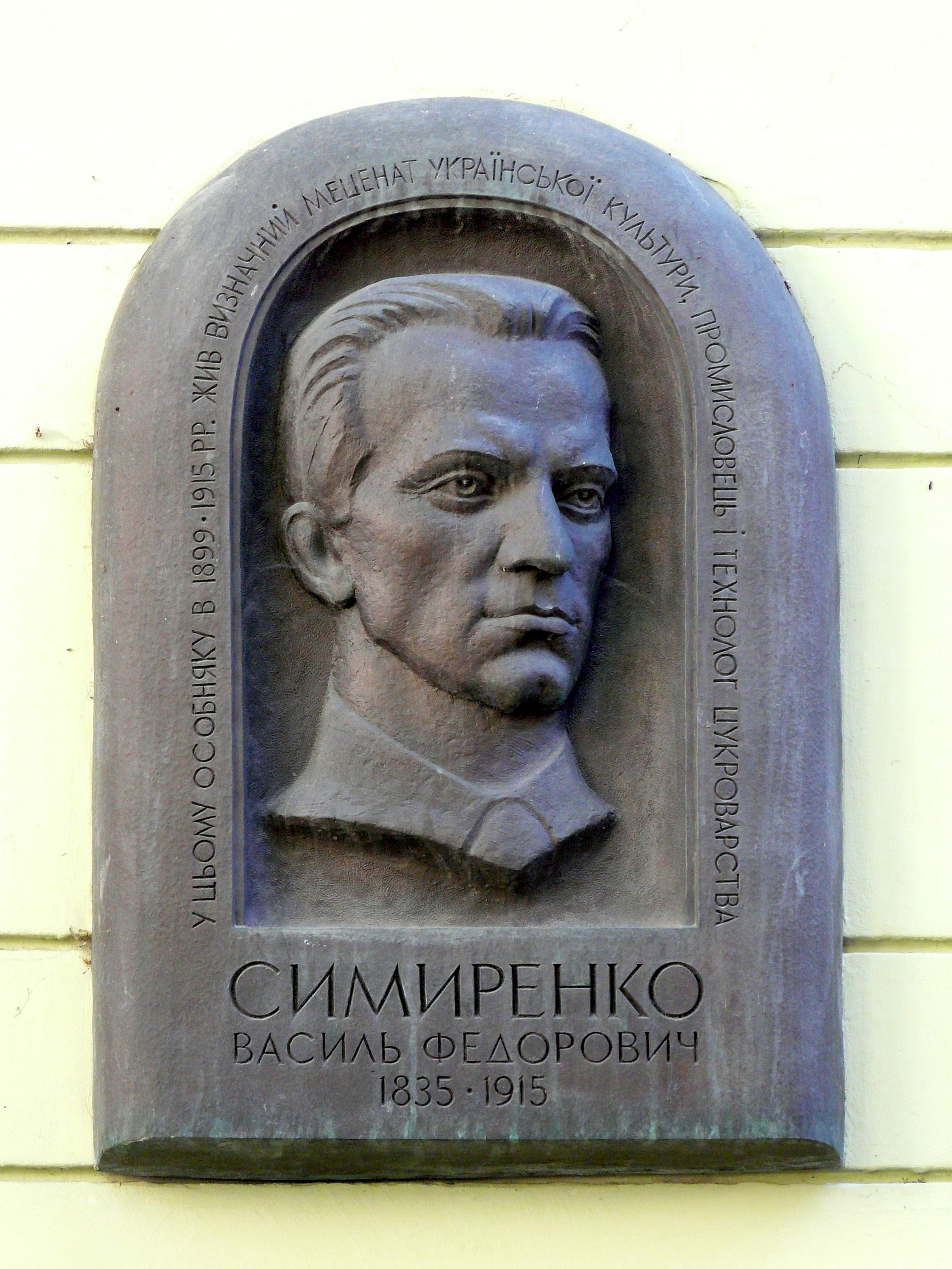 Особняк Симиренків, в якому жив В. Ф. Симиренко, меценат; у 1923–1934 рр. жив О. П. Новицький, історик мистецтва, академік; містилися: у 1919–1924 рр. — Укр. наукове товариство; у 1921–1933 р. — ВУАН; до 1929 р. — Музей українських діячів науки та мистецтва;, Київ, Десятинна вул., 9